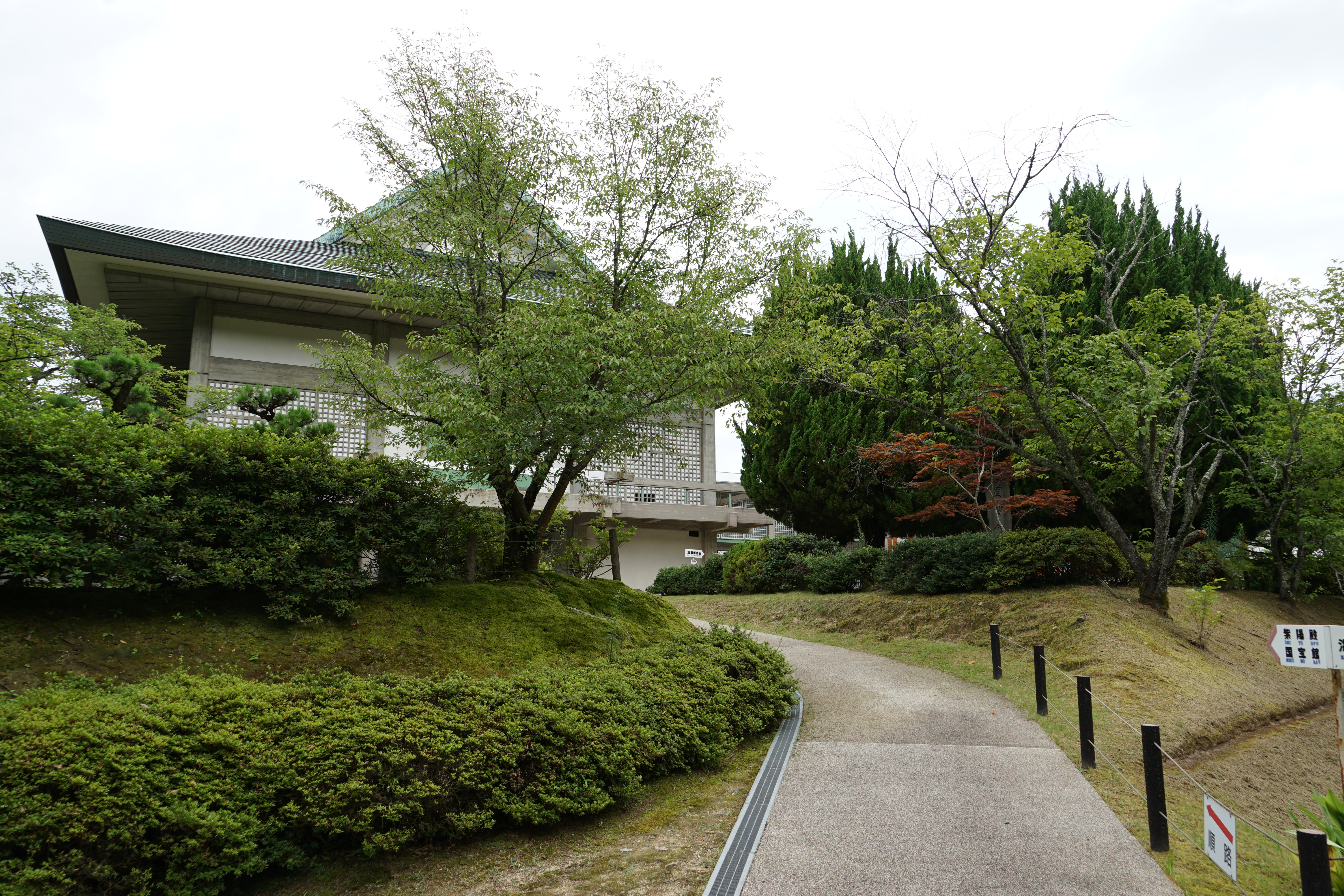 大山祇神社宝物館の内の一つ、紫陽殿。